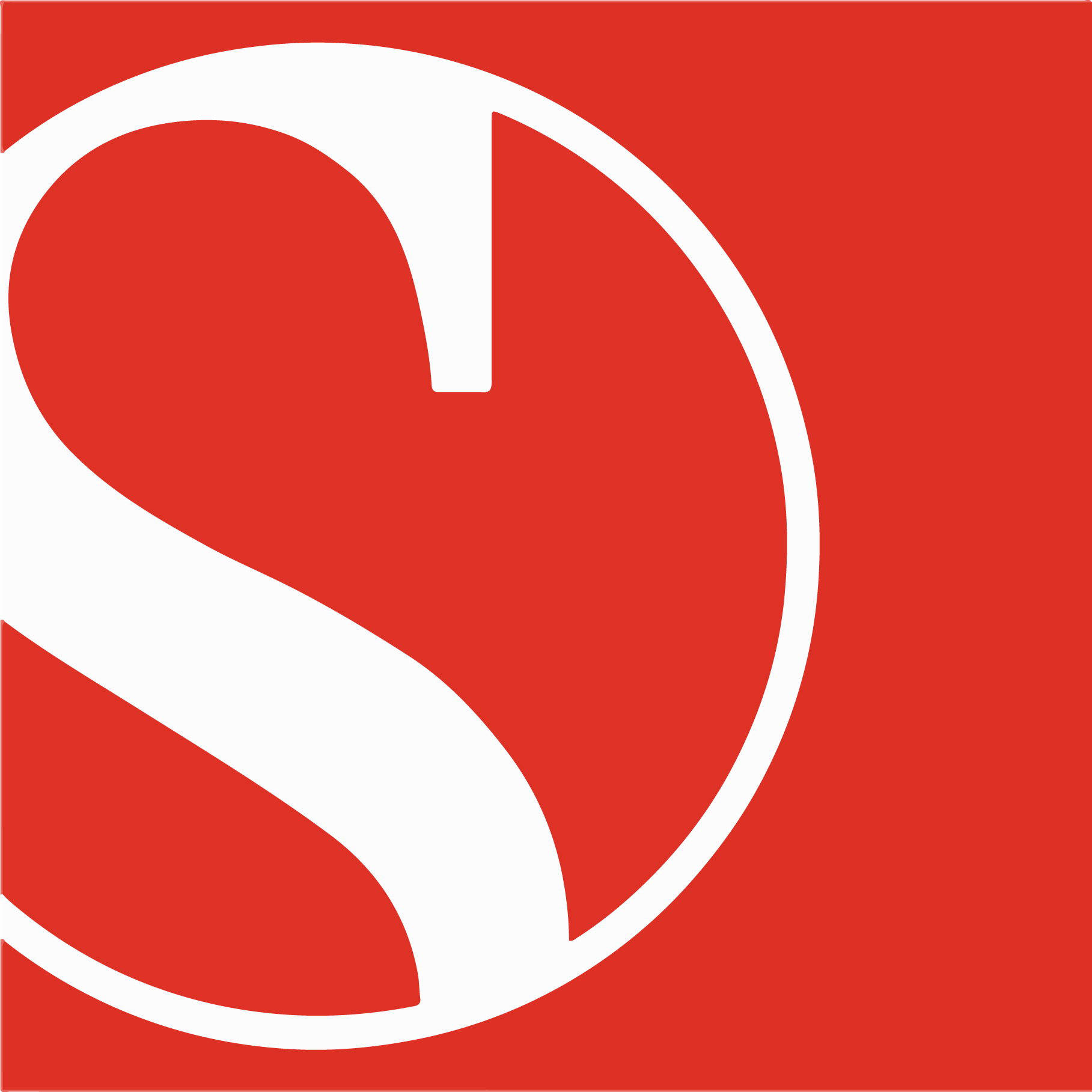 Logo del equipo exportado en Illustrator.